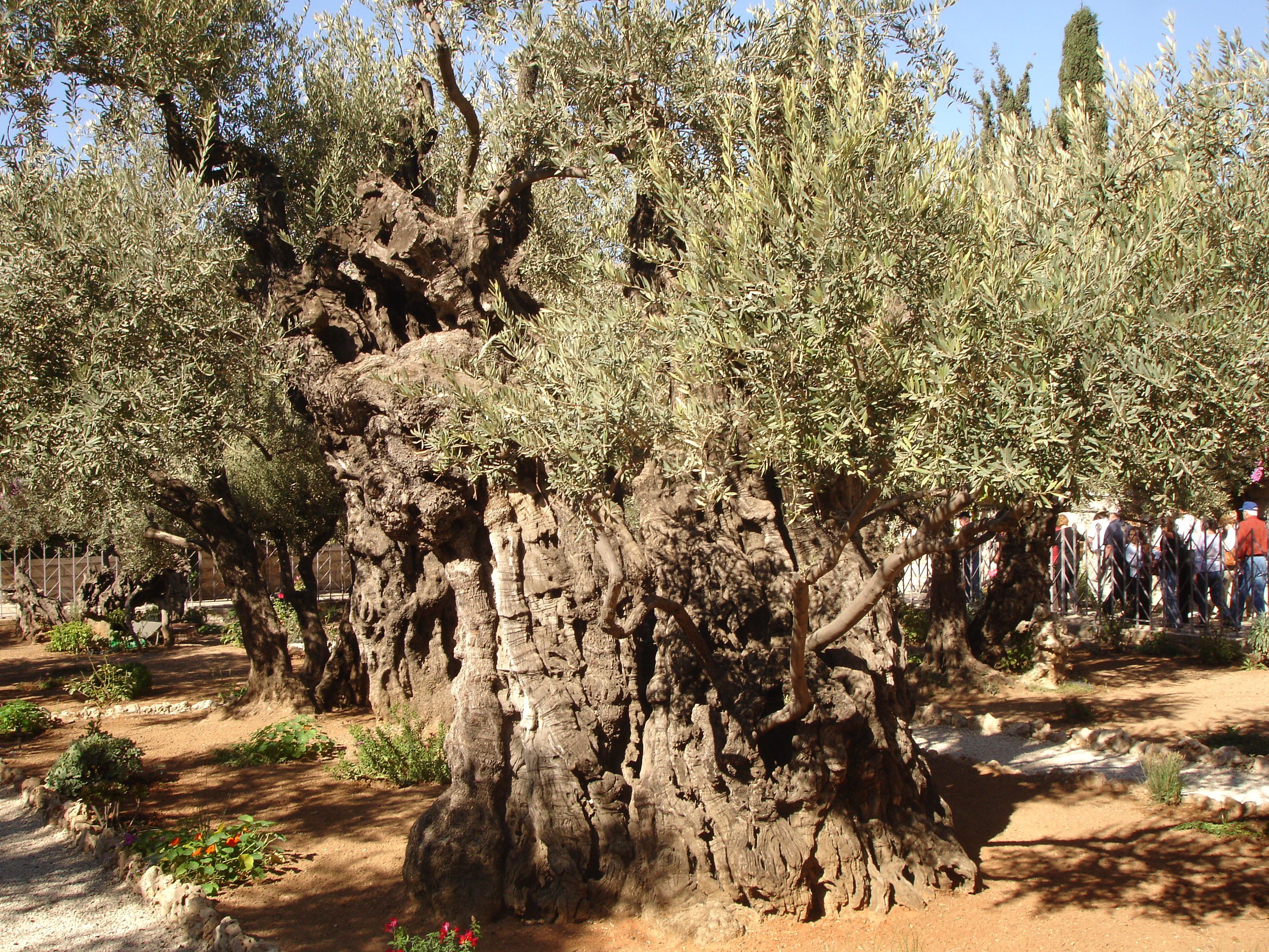 Древние оливы в Гефсимании, Иерусалим.